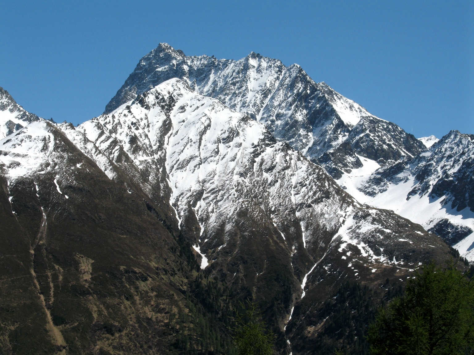 Madatschkopf (Vordergrund) und Wazespitze im Kaunergrat, Ötztaler Alpen.